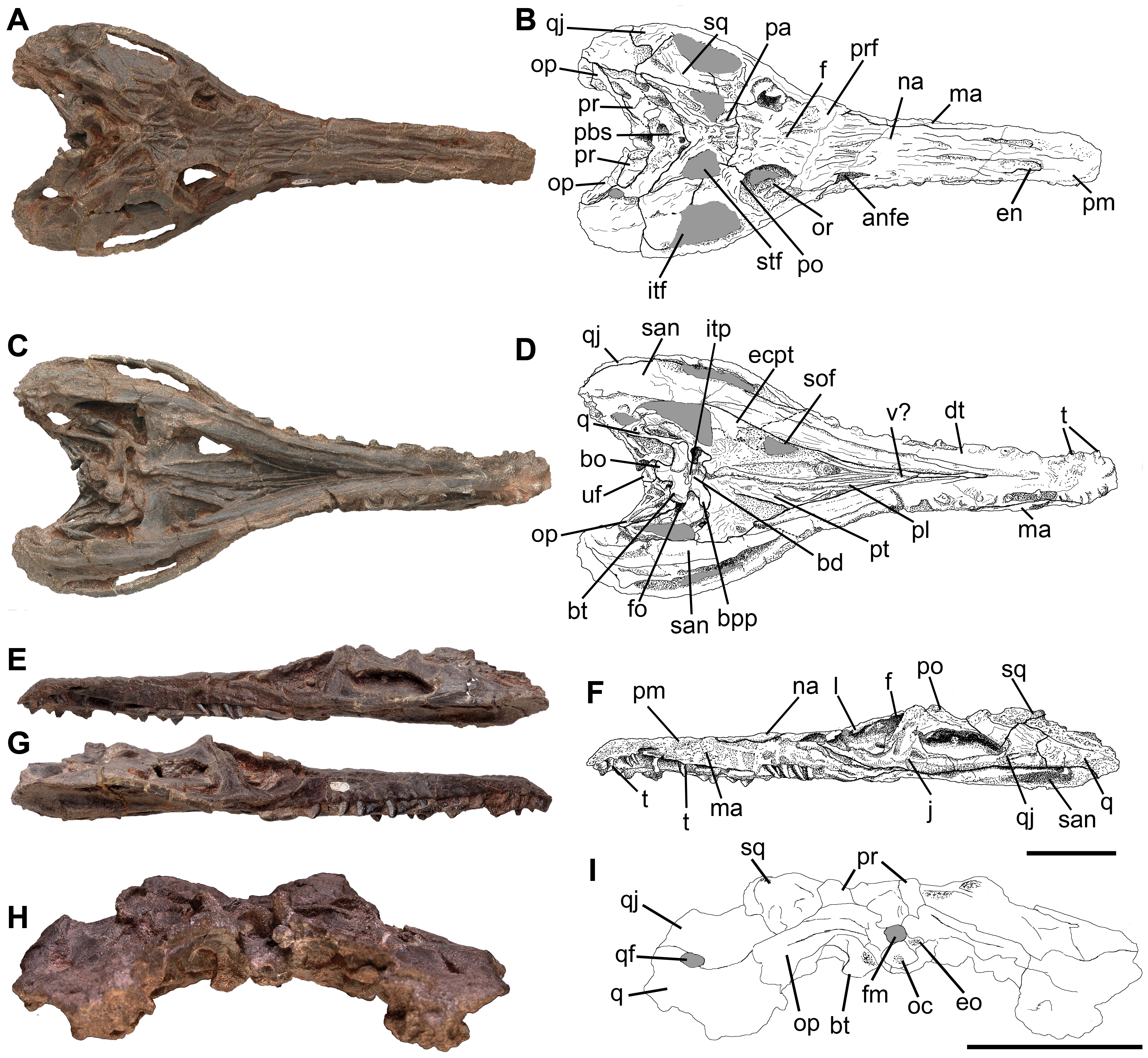 Skull of Pseudochampsa ischigualastensis (PVSJ 567) (A, B) in dorsal, (C, D) ventral, (E, F) left lateral, (G) right lateral, and (H, I) occipital views. Abbreviations: anfe, antorbital fenestra; bo, basioccipital; bpp, basipterygoid process; bd, basisphenoidal depression; bt, basal tubera; dt, dentary; ecpt, ectopterygoid; eo, exoccipital; en, external naris; f, frontal; fm, foramen magnum; fo, fenestra ovalis; itf, infratemporal fenestra; itp, intertuberal plate; j, jugal; l, lacrimal; ma, maxilla; na, nasal; oc, occipital condyle; op, opisthotic; or, orbit; pa, parietal; pbsp, parabasisphenoid; pl, palatine; pm, premaxilla; po, postorbital; pr, prootic; prf, prefrontal; pt, pterygoid; q, quadrate; qf, quadrate foramen; qj, quadratojugal; san, surangular; sof, suborbital fenestra; stf, supratemporal fenestra; sq, squamosal; t, tooth; uf, indeterminate bone fragment; v?, vomer?. Scale bars equal 5 cm.